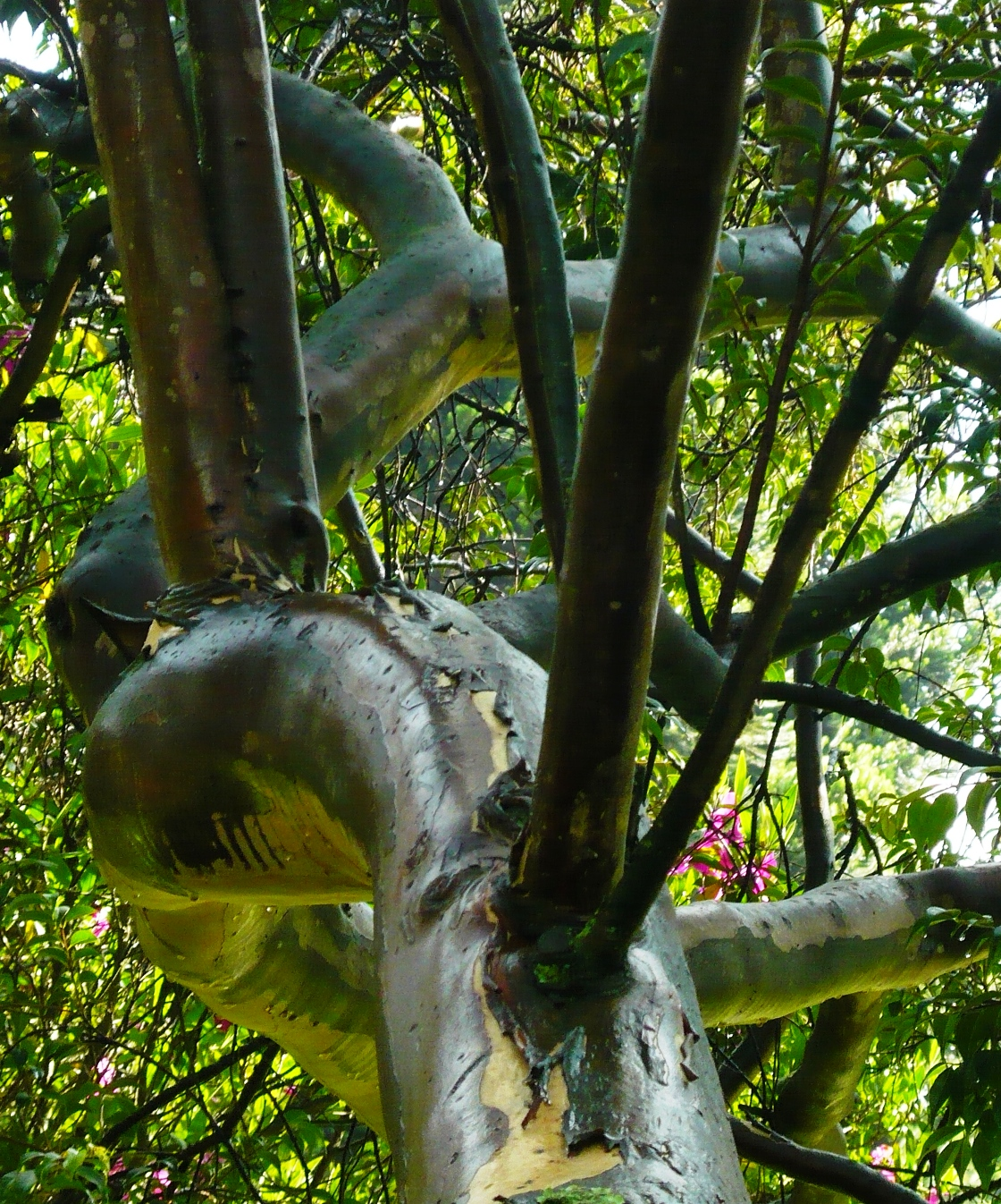 árbol con fuste liso, pocas lenticelas y sin fisuras.